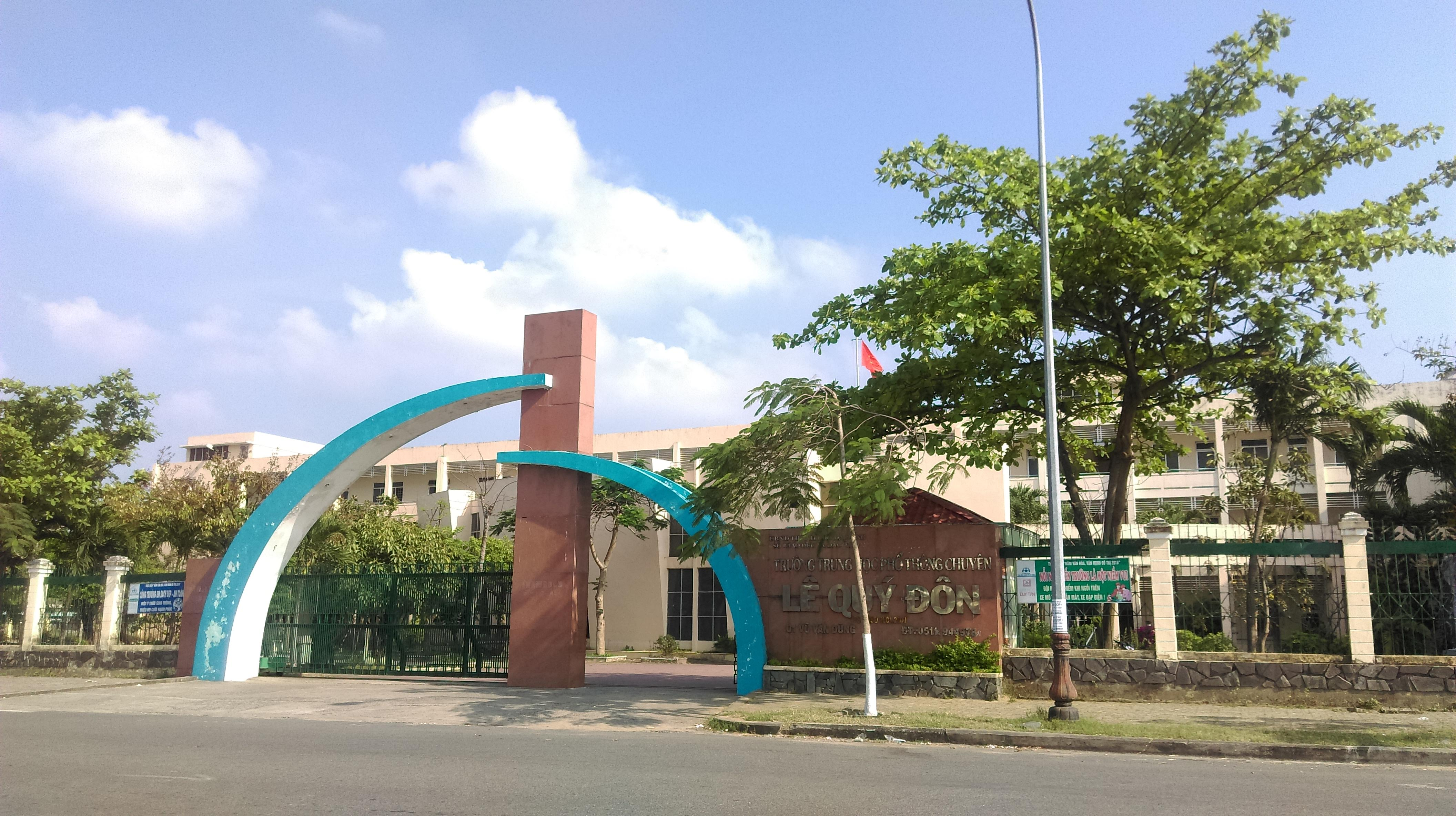 Trường THPT chuyên Lê Quý Đôn, Đà Nẵng